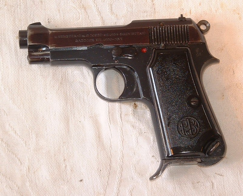 Imagine autoprodotta.